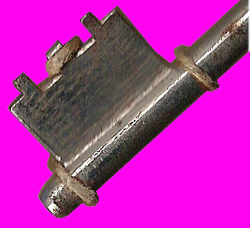 Panneton d'une clé